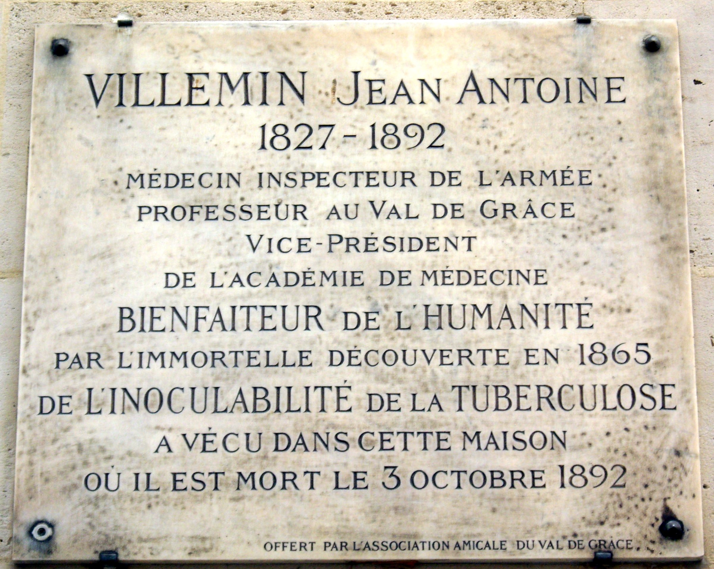 Plaque apposée au n° 31 de la rue de Bellechasse, Paris 7e, où habita le médecin Jean-Antoine Villemin (1827-1892) et où il mourut le 3 octobre 1892.